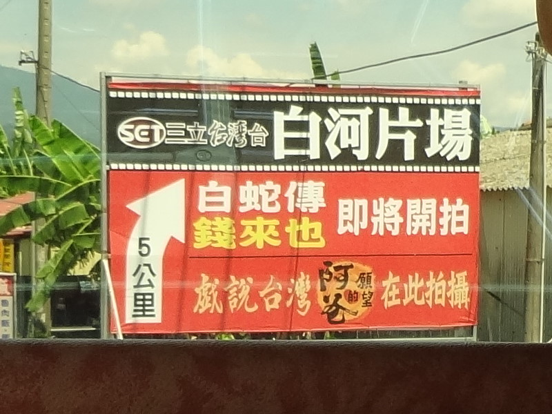 於遊覽車上層第一排座位拍攝台南市白河區三立台灣台白河片場廣告布幕。